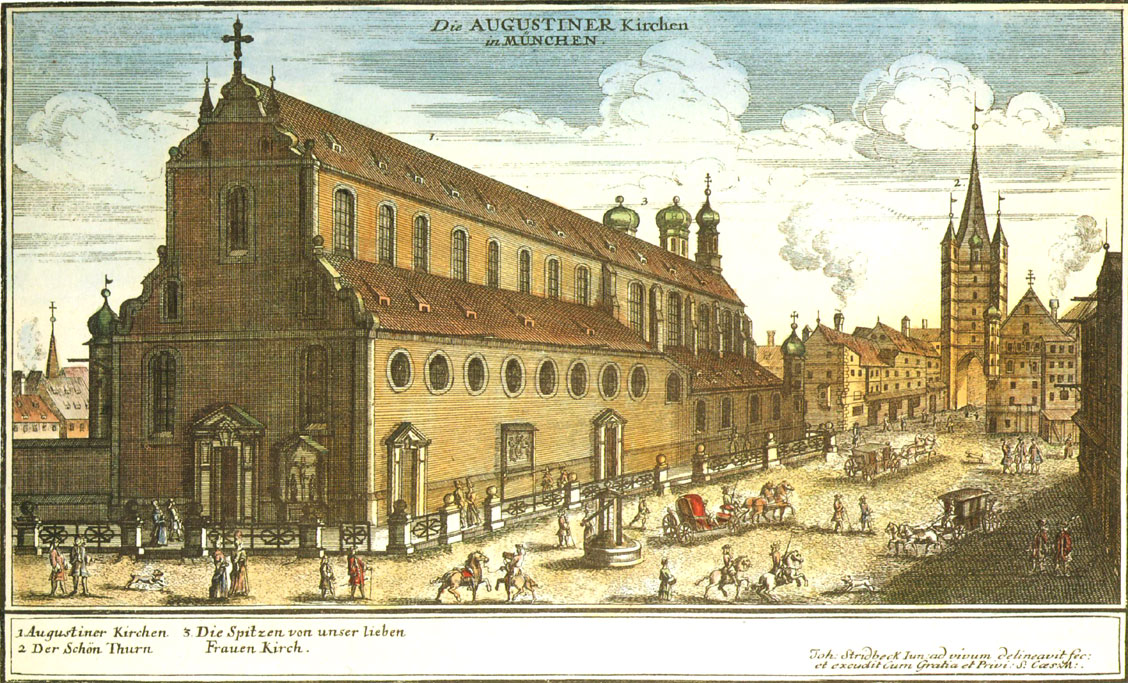 Auf dem Kupferstich ist die Augustinerkirche abgebildet, die sich ehemals an der Neuhauserstrasse befand. Diese wurde ab 1804 als Mauthalle verwendet. Rechts hinten ist das Kaufingertor (Schöner Turm) zu sehen.